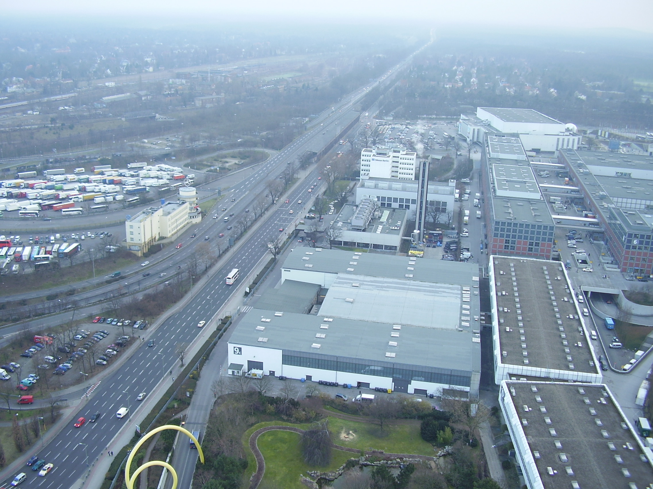 View from Funkturm Berlin; Blick vom Berliner Funkturm